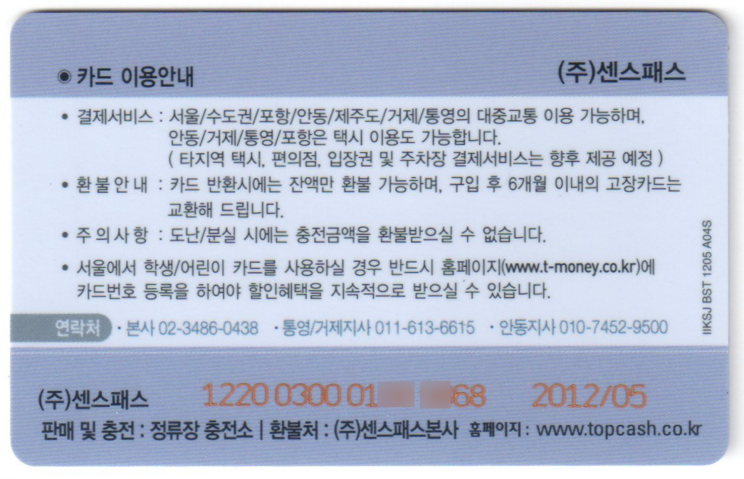 센스패스 교통카드 뒷면 (탑캐시 디자인)